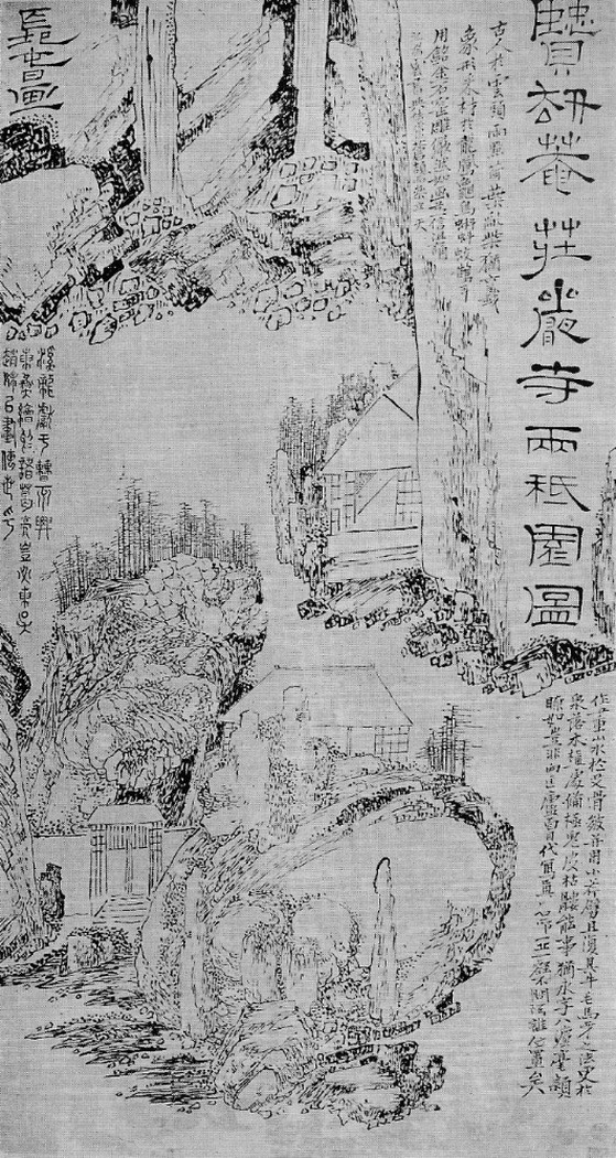 Les deux monastères (planche 44, première des 4 planches 44, 45, 46, 47). Papier, 74x39cm. Signé. Composition extraordinaire rigoureuse et complexe, qui réussit à unifier par la seule logique formelle du graphisme les espaces hétérogènes de trois scènes différentes, et cinq séries d'inscriptions calligraphiques en trois graphies distinctes. Ce chef-d'œuvre appartient sans doute aux dernières années de l'artiste. L'artifice qui consiste à employer deux tonalités d'encre différentes pour rompre la monotonie du trait, est maintenant abandonné; la seule intensité rythmique des traits et des points suffit à animer l'œuvre.